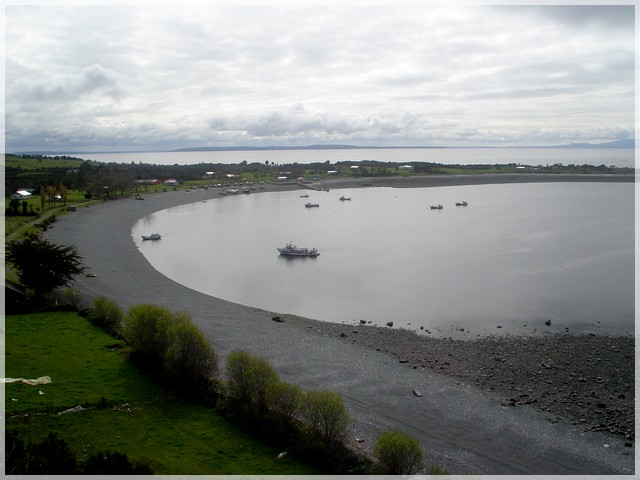 Isla Queullin, Comuna de Calbuco,Chile